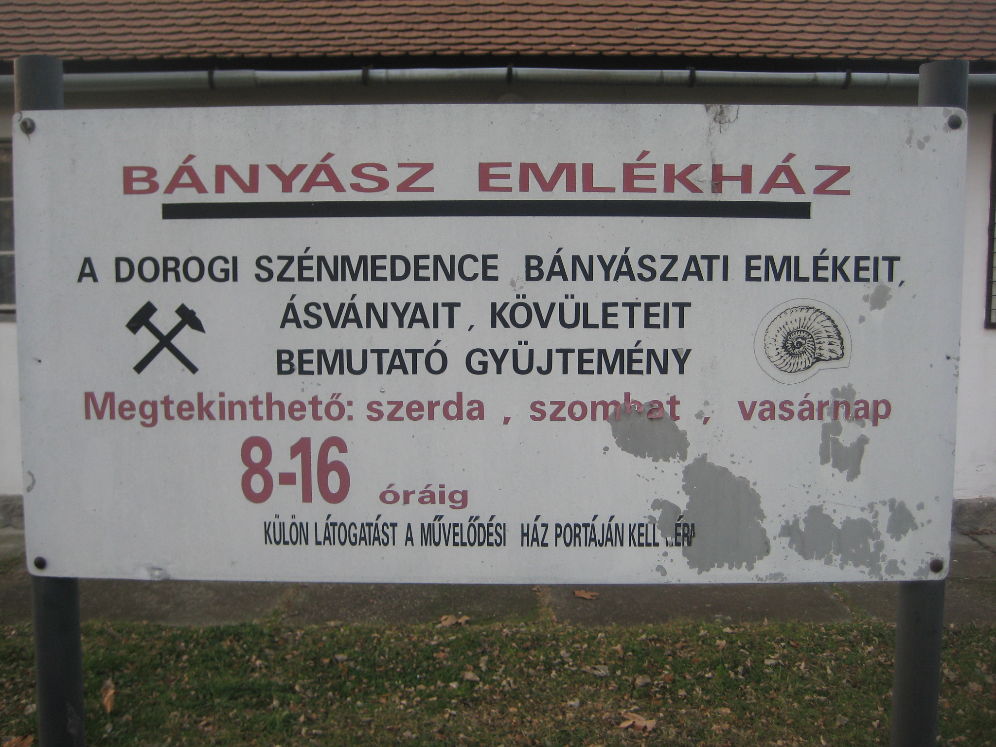 A dorogi bányász emlékház tájékoztató táblája.